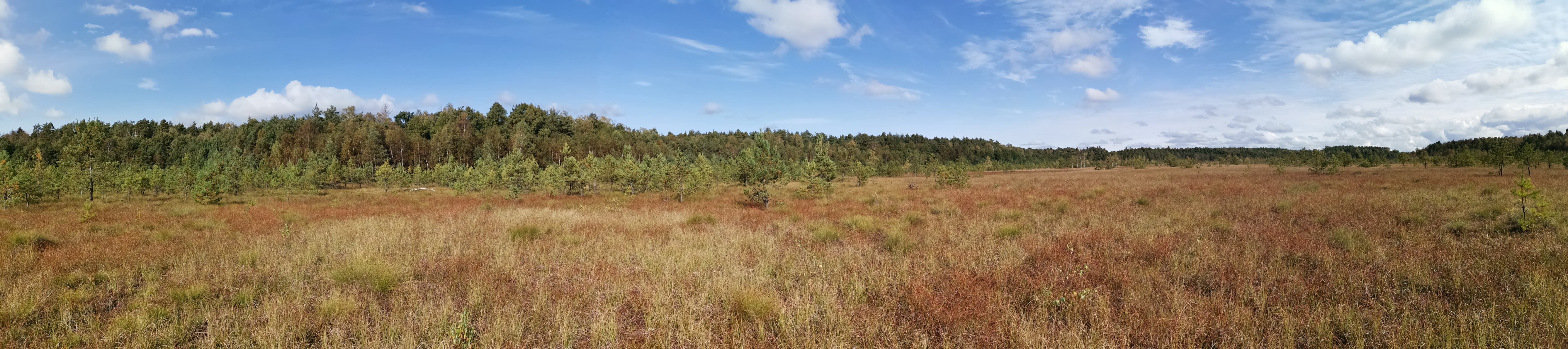 Panorama torfowiska w październiku